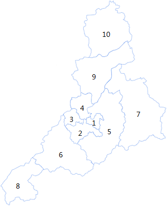 济南政区图——含数字